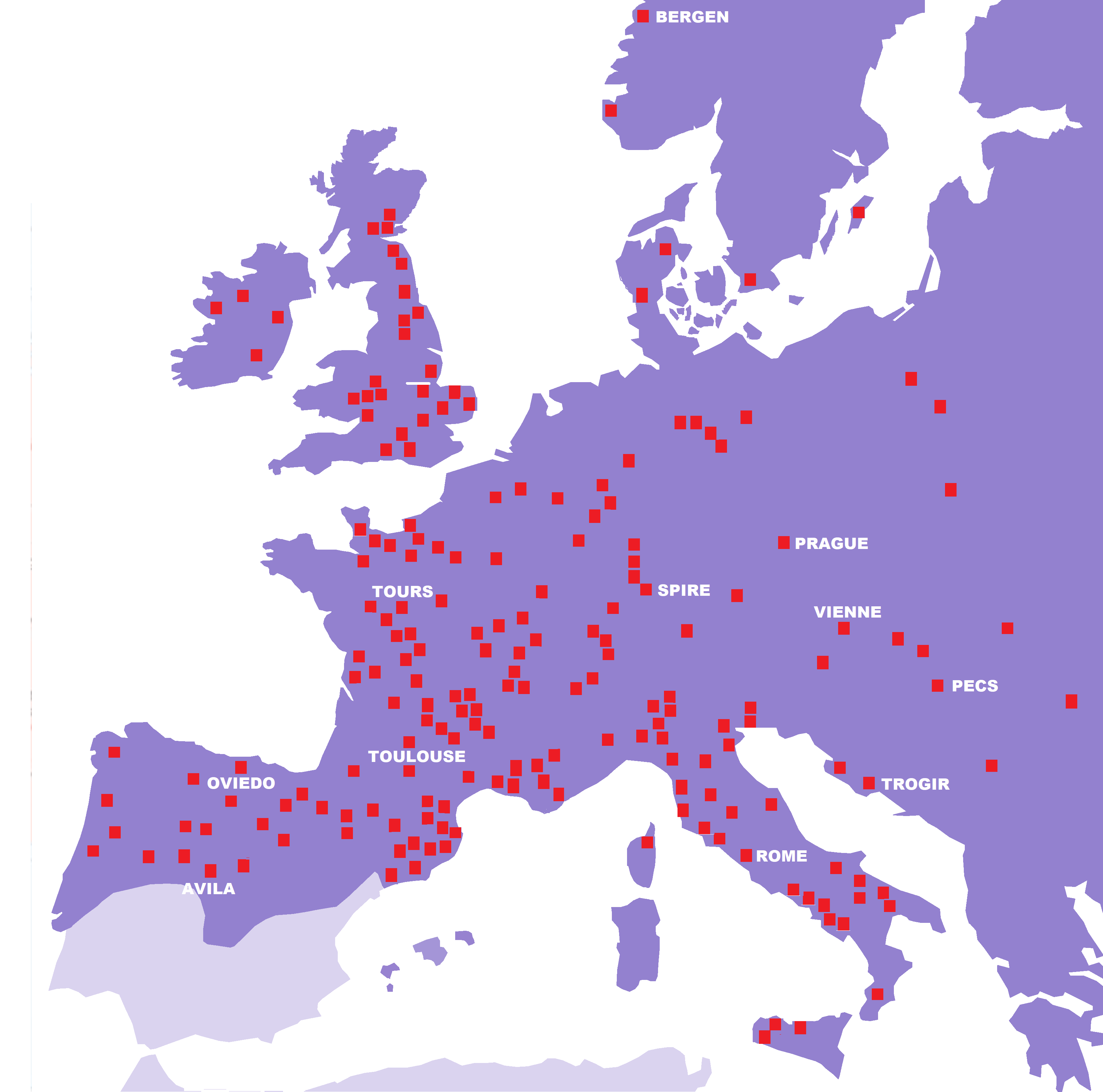 Carte de l'Occident roman